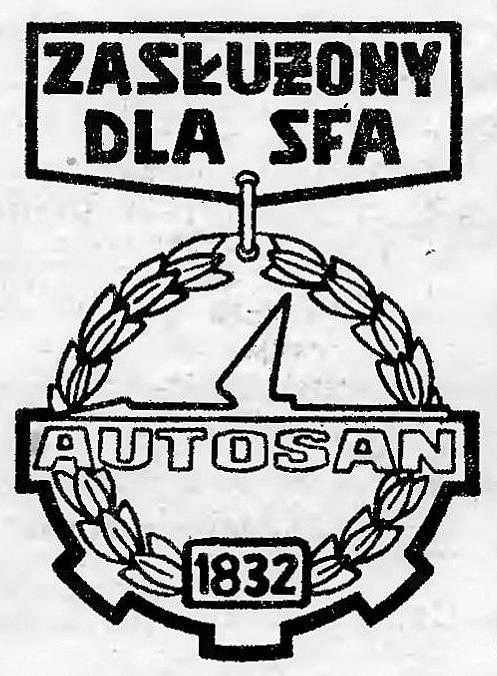 Odznaka Zasłużony dla SFA (Sanockiej Fabryki Autobusów). Autor projektu: Zbigniew Osenkowski